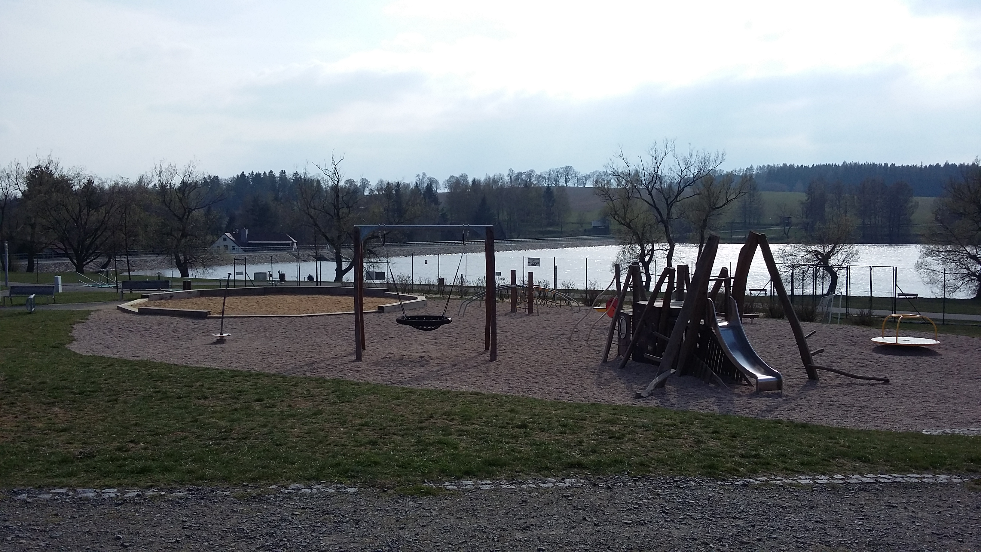 Dětské hřiště, rekreační areál Pilák, Pilská vodní nádrž, Žďár nad Sázavou.